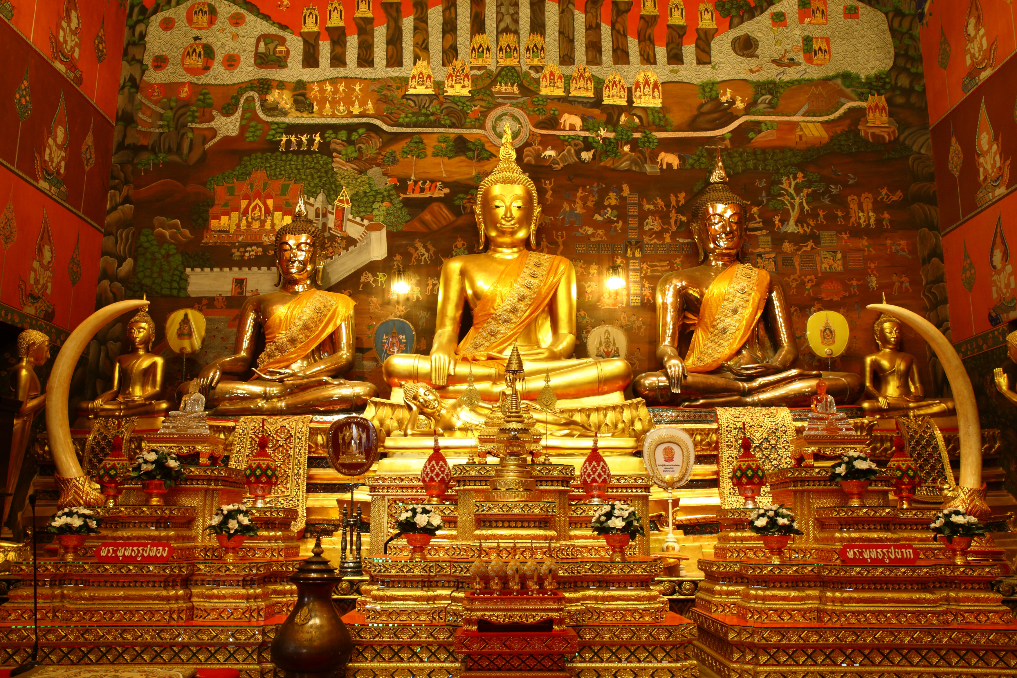 พระพุทธรูปทองคำ ปูน นาก อยู่ในพระอุโบสถ